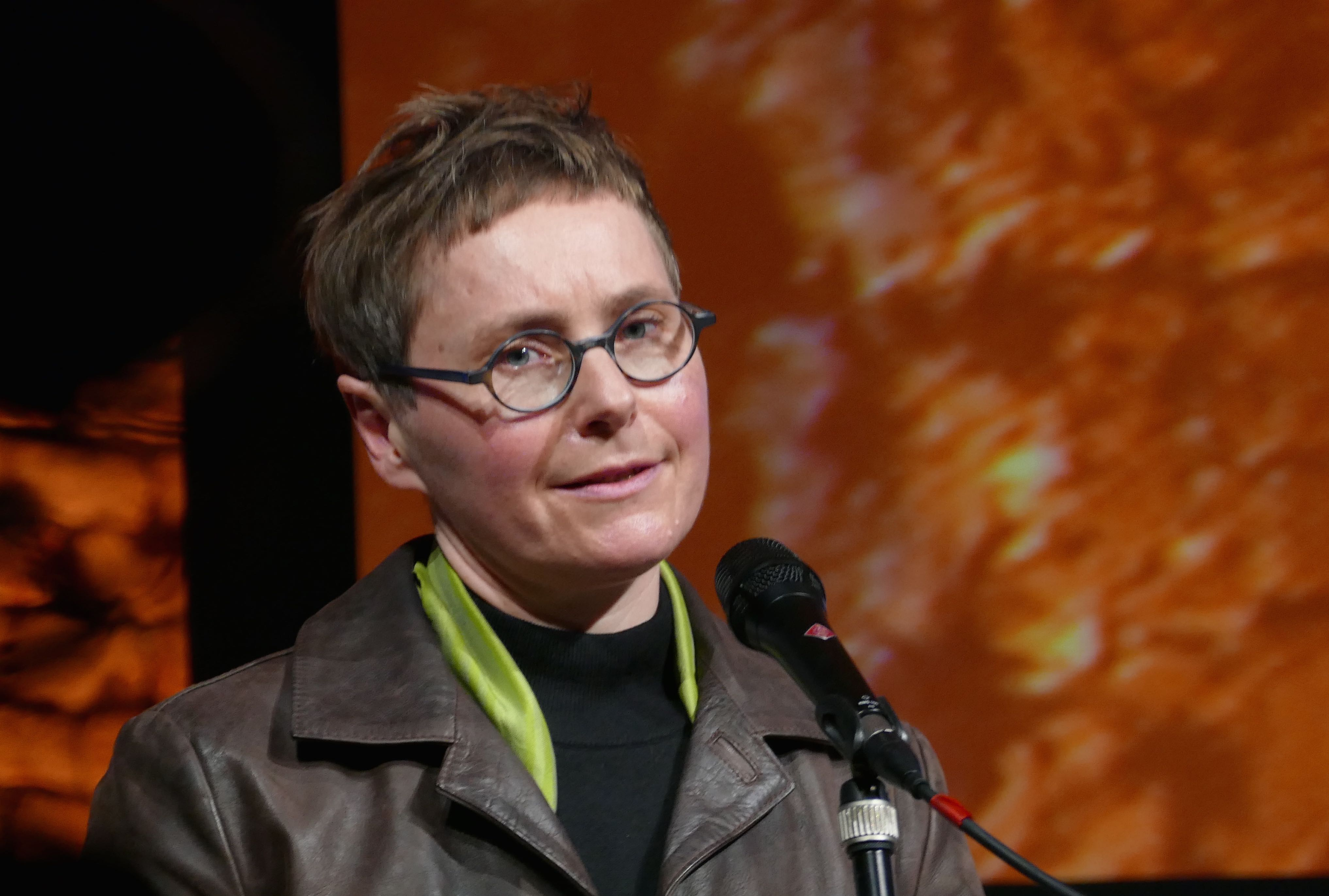 Angela Steidle bei ihrer Dankesrede anlässlich der Verleihung des Bayerischen Buchpreises für ihren Roman "Rosenstengel"